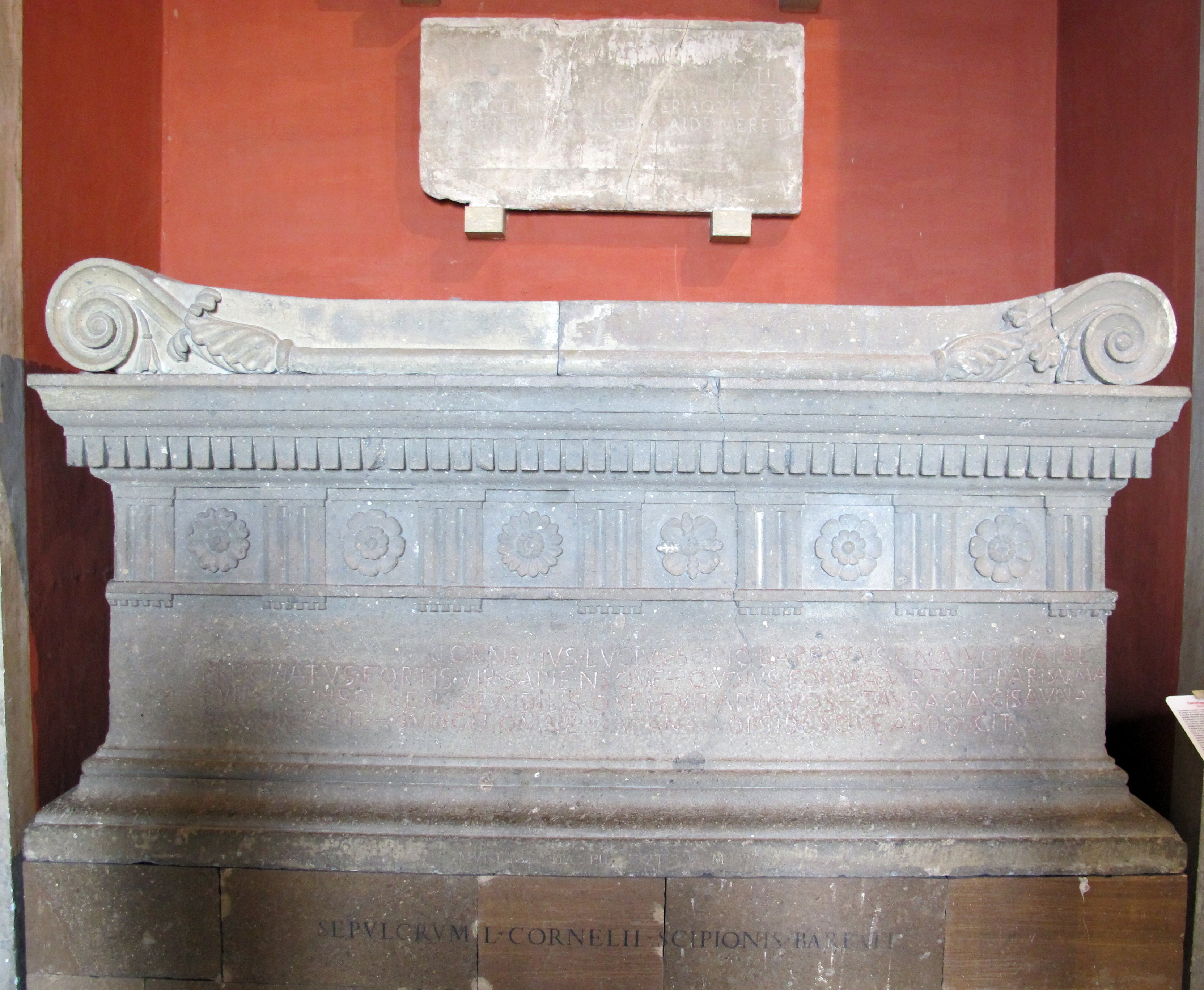 Arte romana nei Musei Vaticani